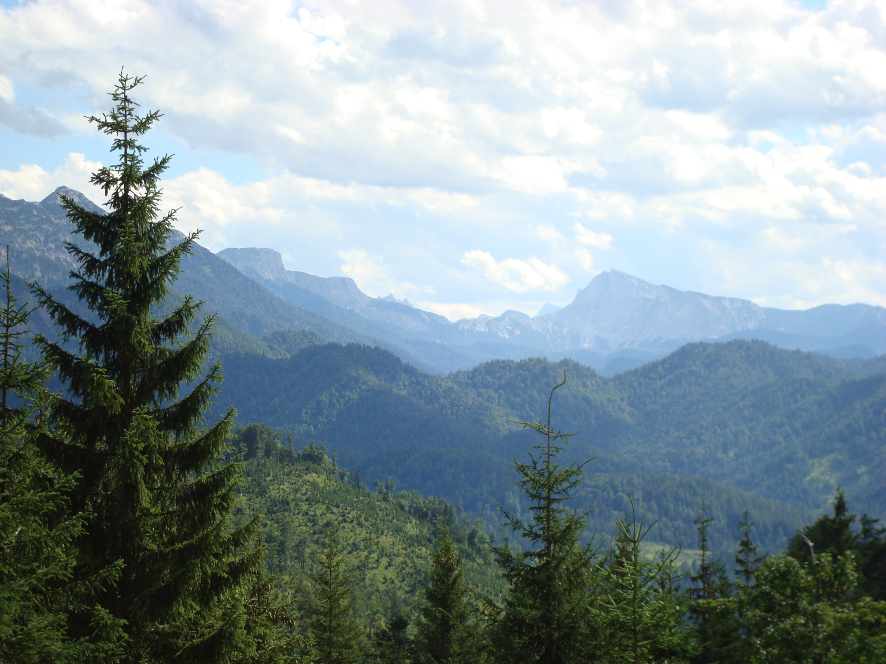 Rothwald I This media shows the nature reserve in Lower Austria with the ID 11.